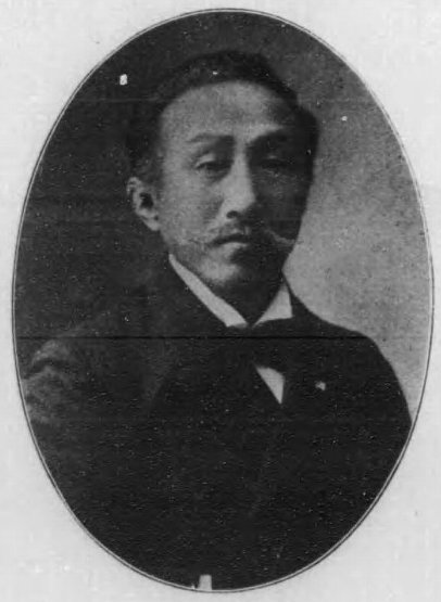 三好退蔵（1845-1908）